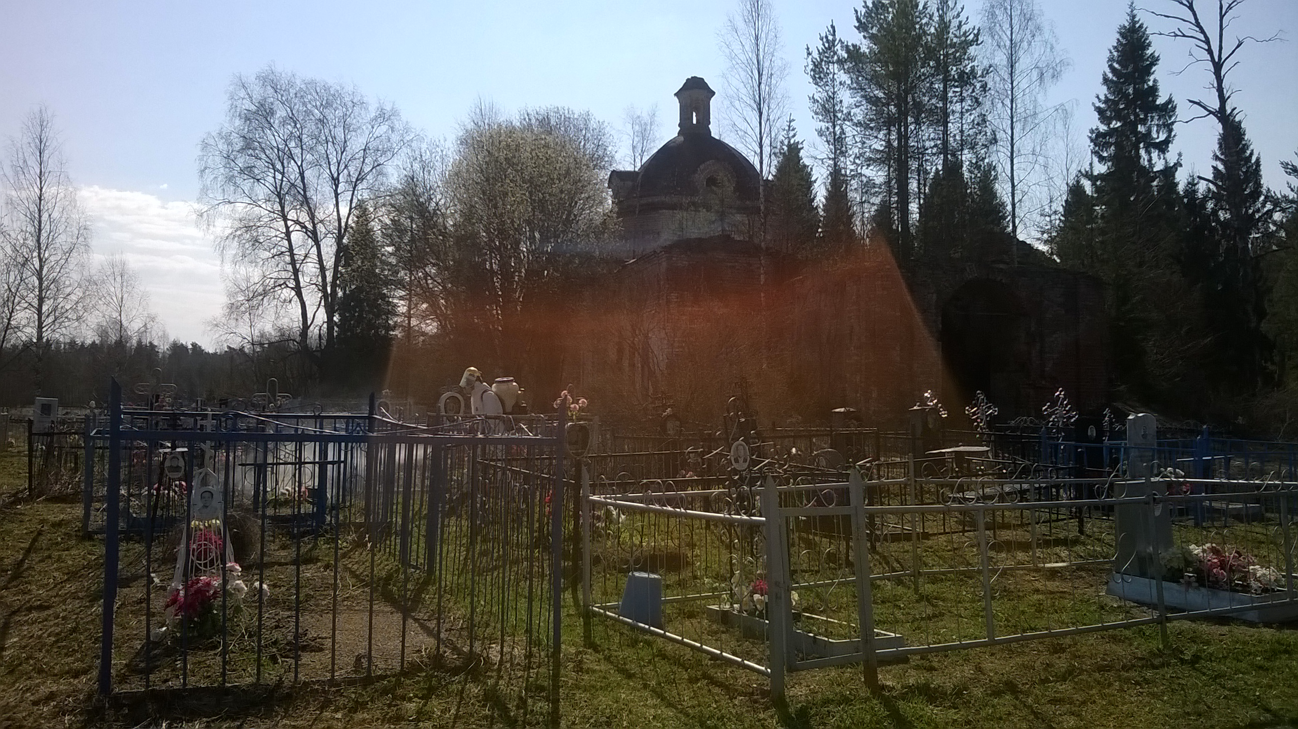 Руины у кладбища